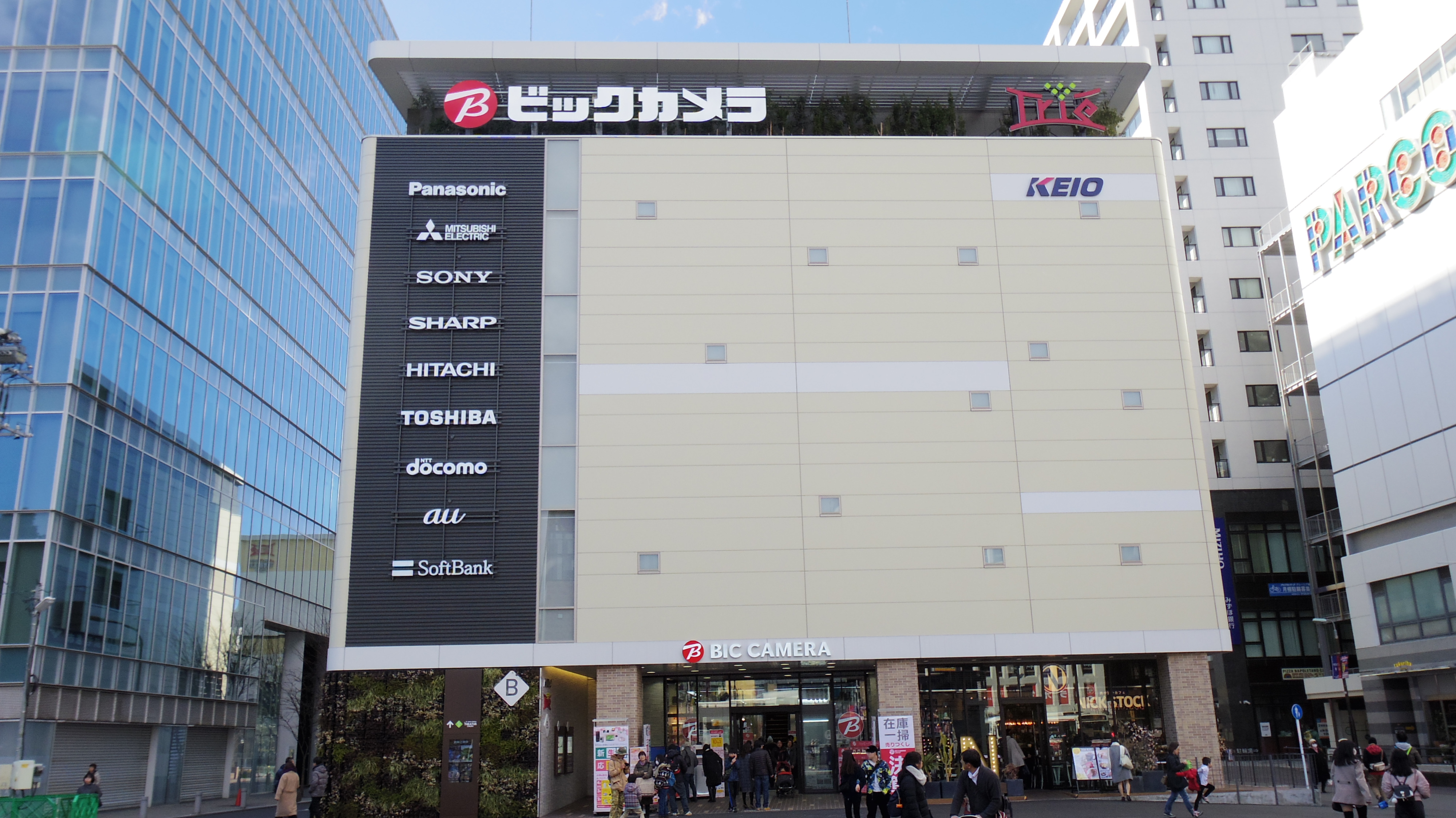 京王線調布駅前ビル「トリエ」B館・ビックカメラ調布店（2018年2月12日撮影）